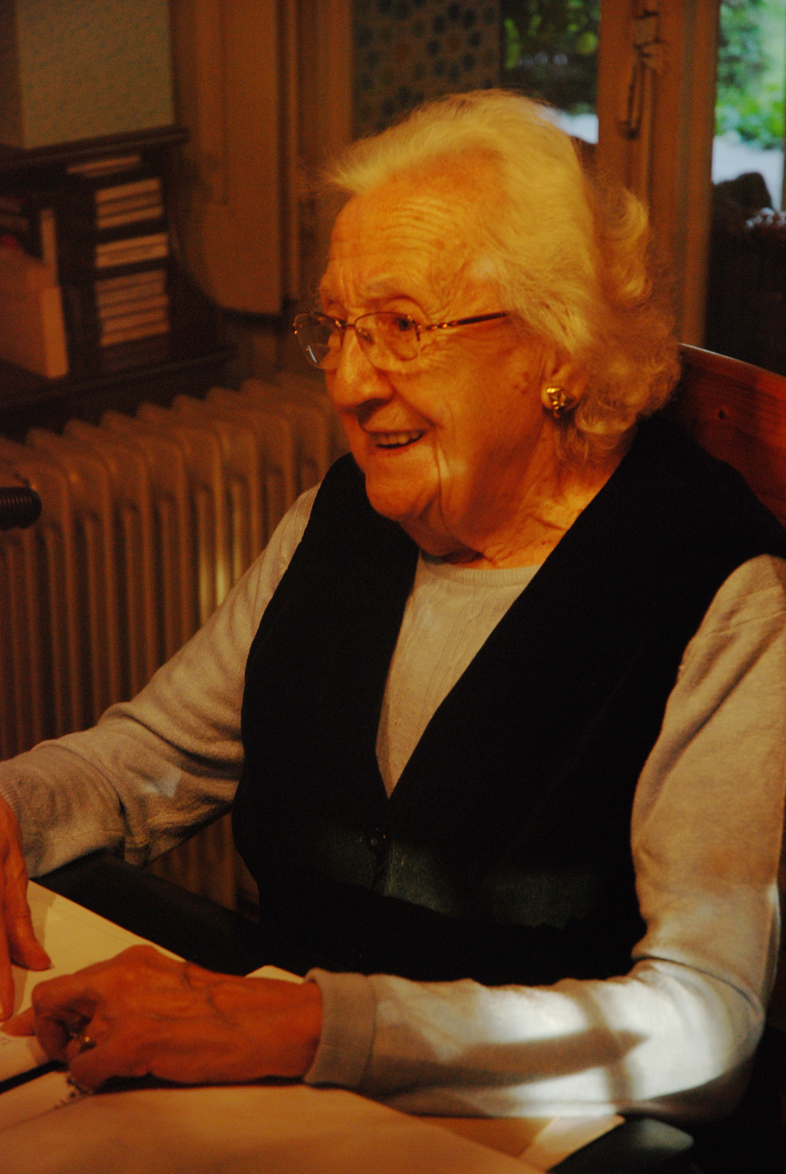 Joana Raspall i Juanola